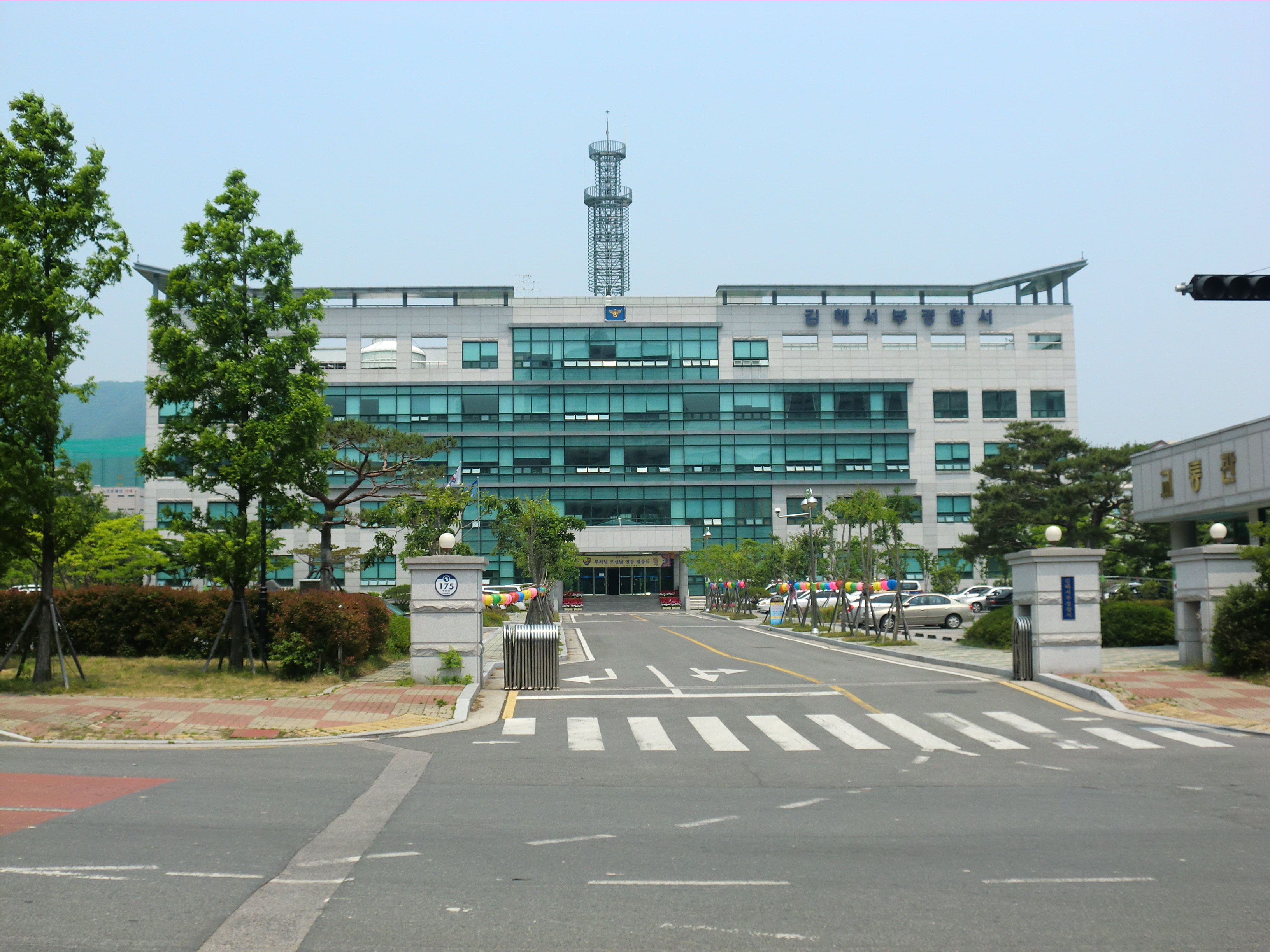 경상남도 김해시에 있는 김해서부경찰서